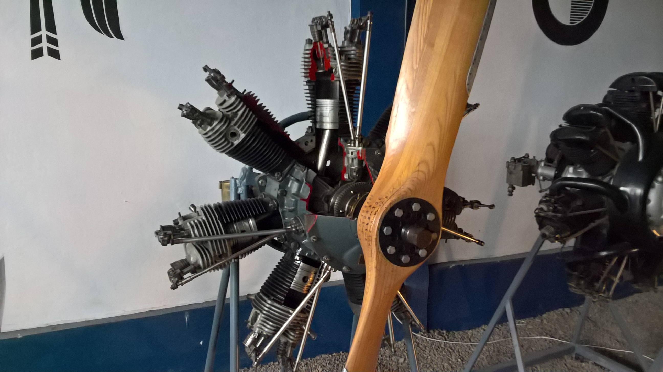 Niemiecki 7-cylindrowy silnik gwiazdowy Siemens-Halske Sh-14 ze zbiorów Muzeum Lotnictwa Polskiego w Krakowie.